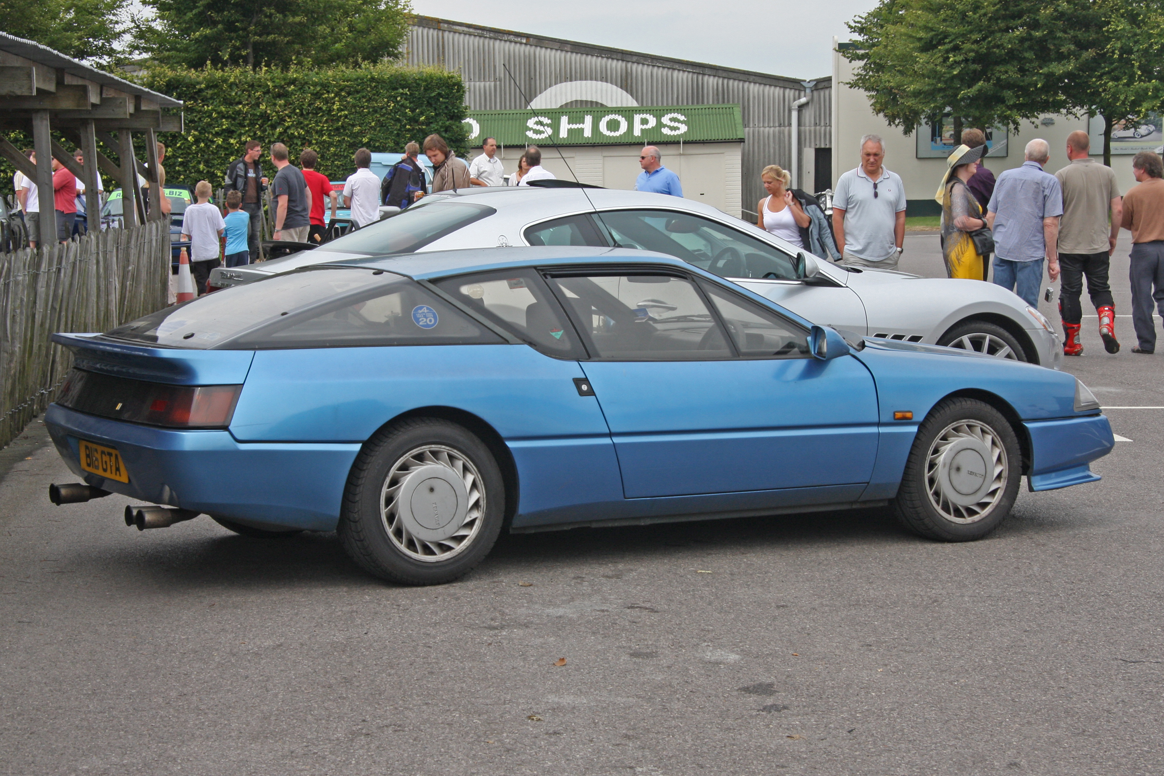 Renault GTA